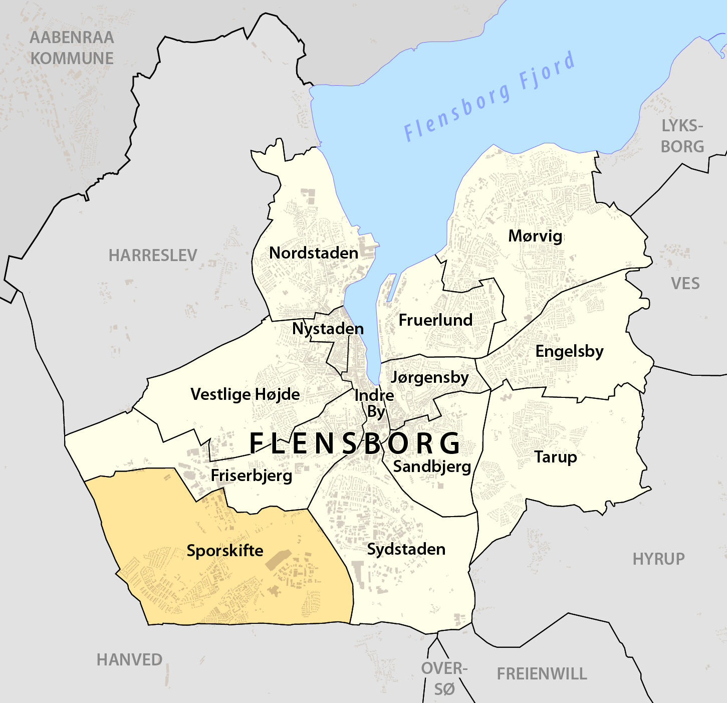 Beliggendhed af Sporskifte i Flensborg Kommune